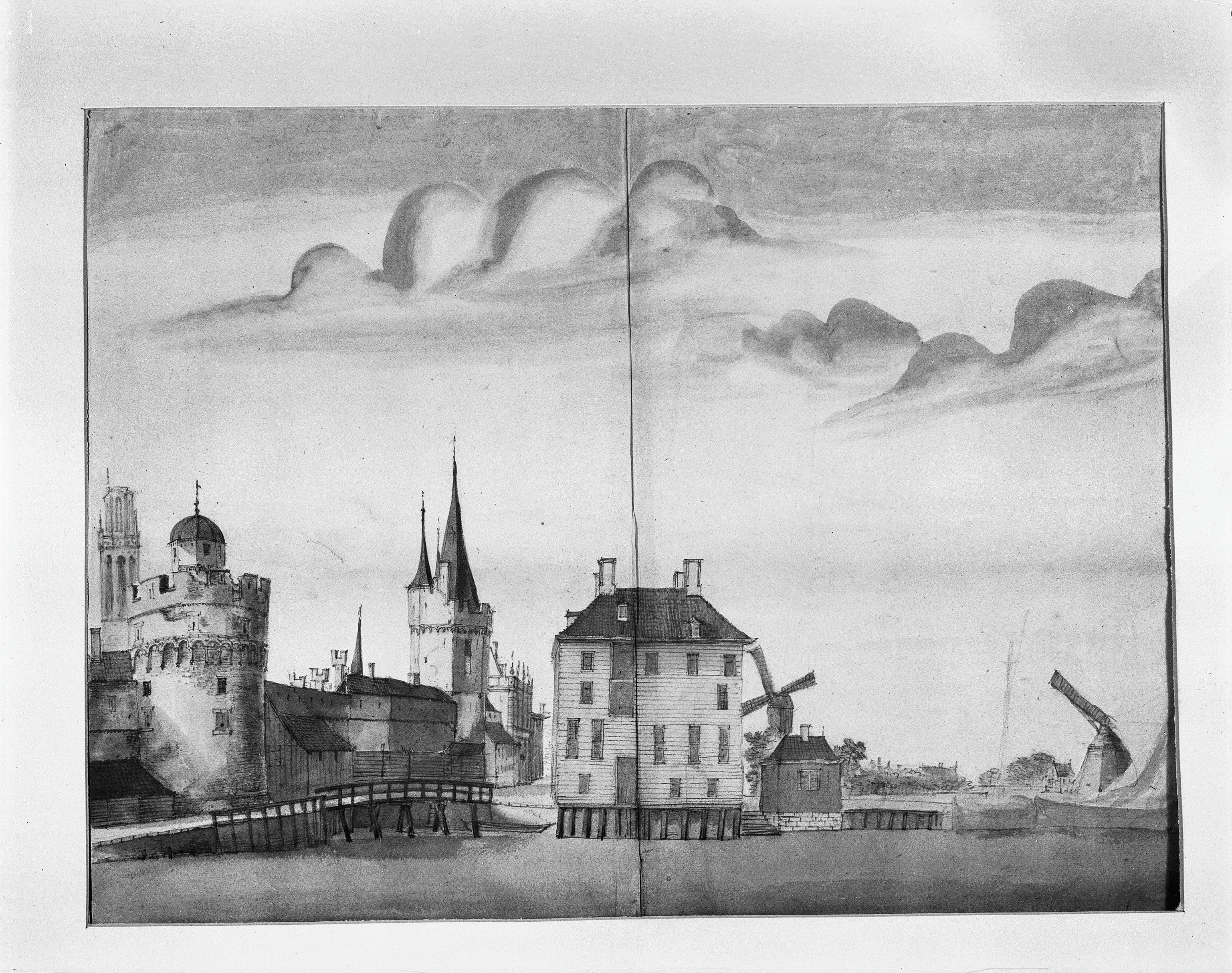 Wallen: Stadsmuur en Hopmanshuis, tekening A.Beerstraten in bezit van Museum Zwolle